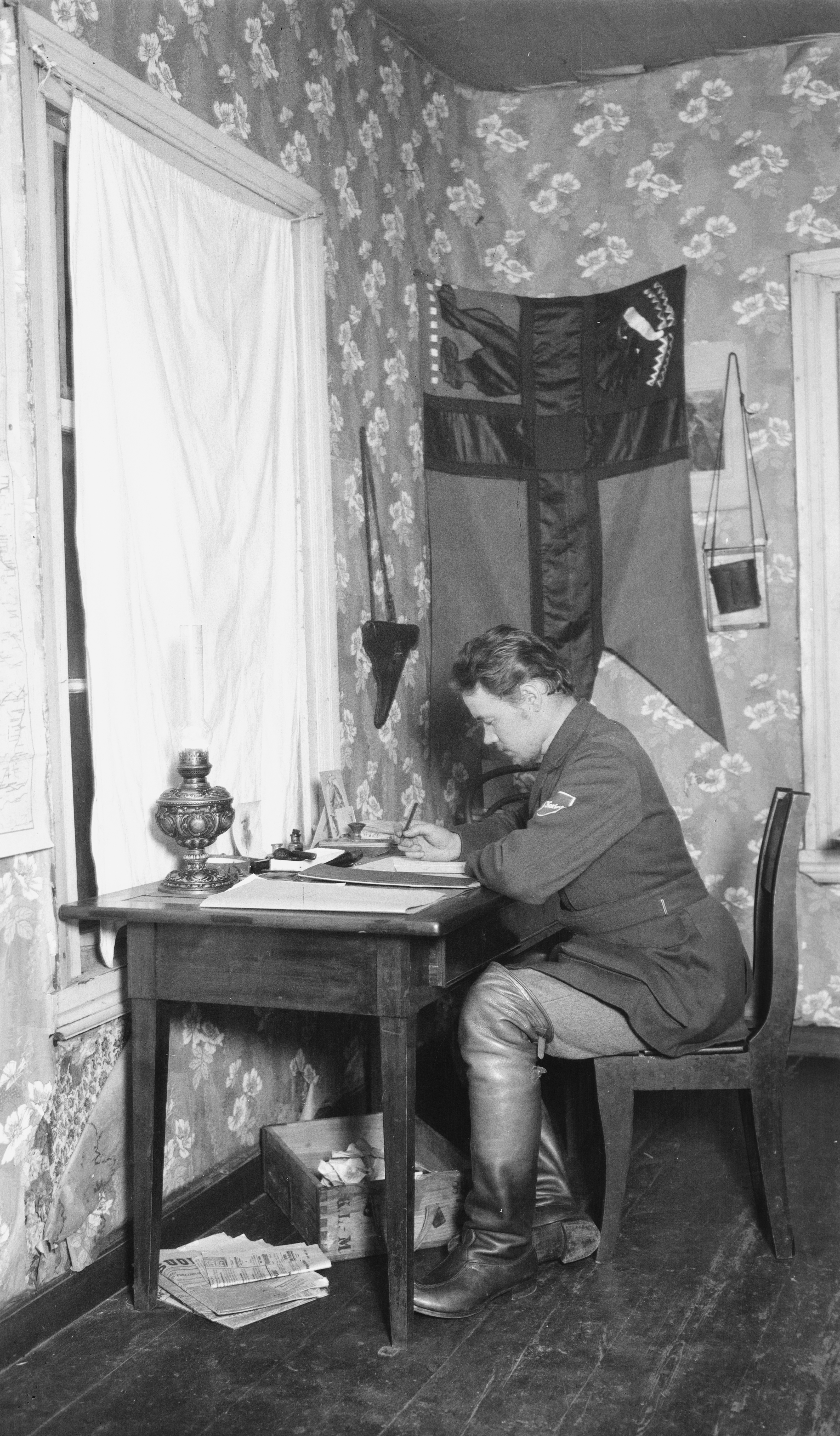 Itäkarjalaisten kansannousun ylipäällikkö Ilmarinen eli Jalmari Takkinen työpöytänsä ääressä 1921–1922